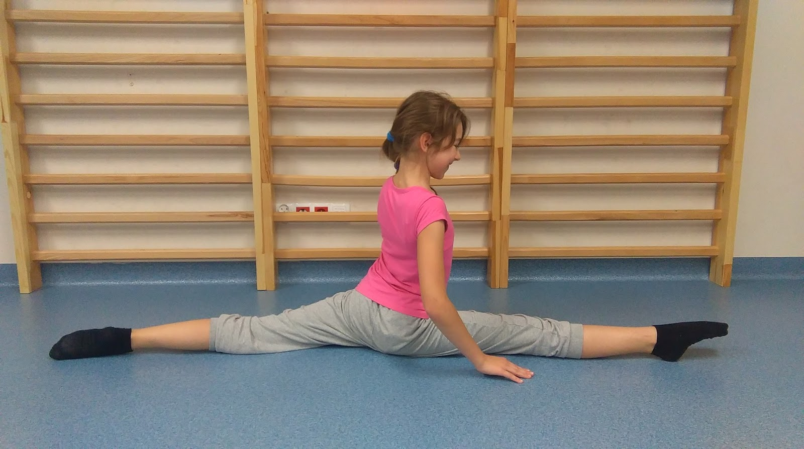 szpagat francuski